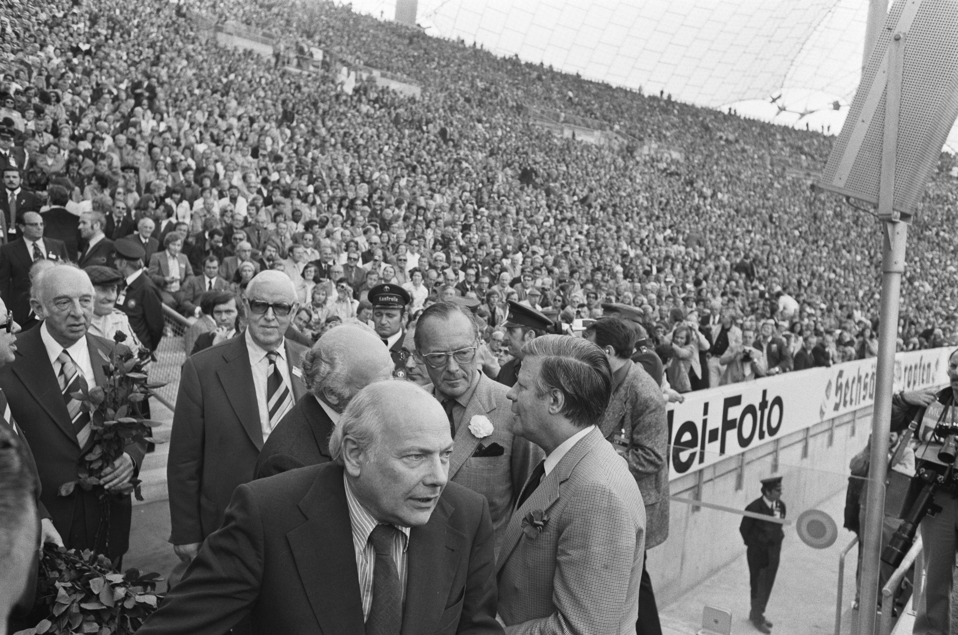 Collectie / Archief : Fotocollectie Anefo Reportage / Serie : [ onbekend ] Beschrijving : Finale wereldkampioenschap voetbal 1974 in Munchen, West Duitsland tegen Nederland 2-1; de spelers komen het veld op Datum : 7 juli 1974 Locatie : München, Nederland, West-Duitsland Trefwoorden : finales, sport, voetbal, wereldkampioenschappen Fotograaf : Verhoeff, Bert / Anefo Auteursrechthebbende : Nationaal Archief Materiaalsoort : Negatief (zwart/wit) Nummer archiefinventaris : bekijk toegang 2.24.01.05 Bestanddeelnummer : 927-3112